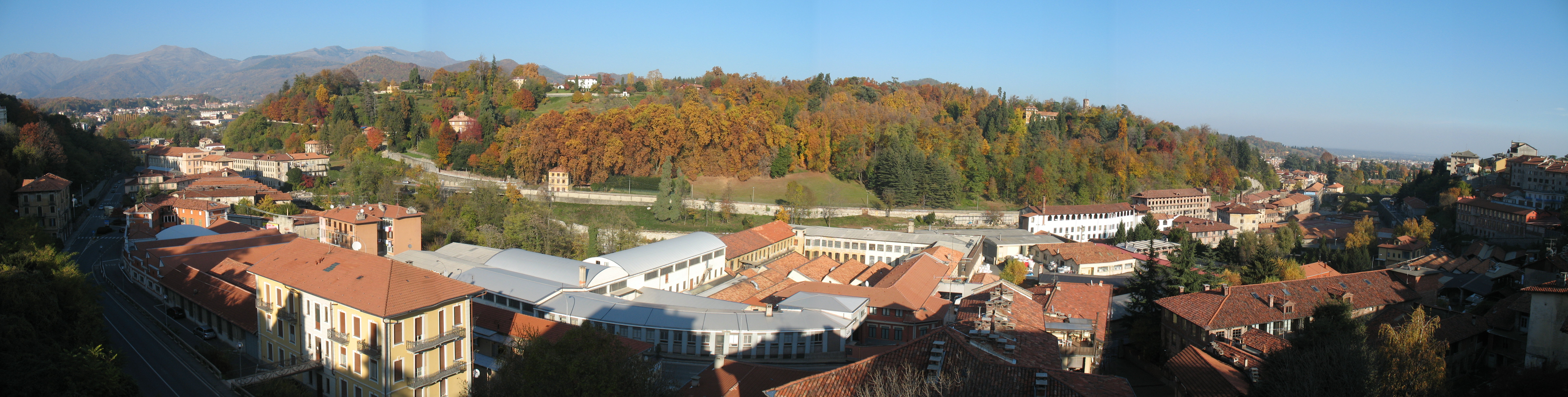 Biella - panorama sulla città in direzione di Chiavazza. Di fronte la collina di Pavignano